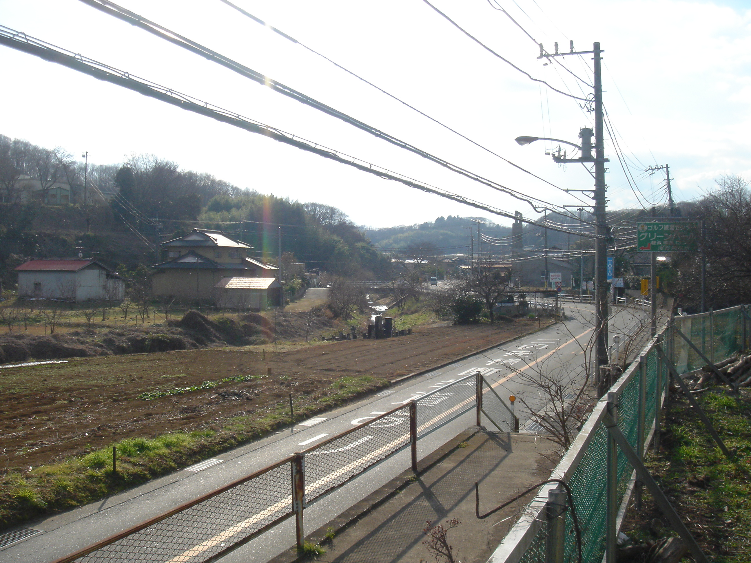 神奈川県道77号平塚松田線。平塚市土屋付近。